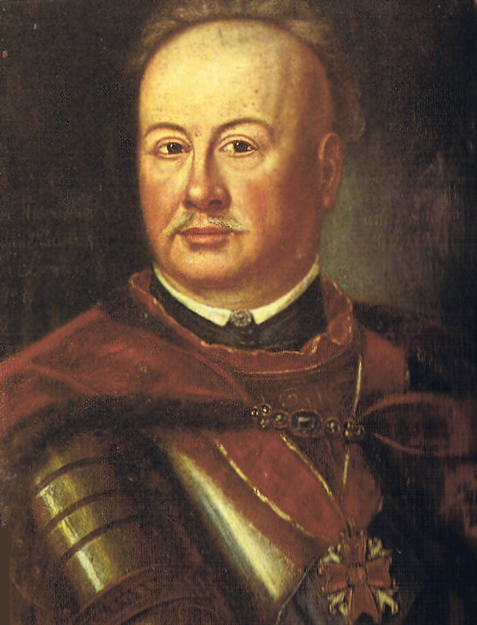 Franciszek Kwilecki on anonymous poortrait before 1794